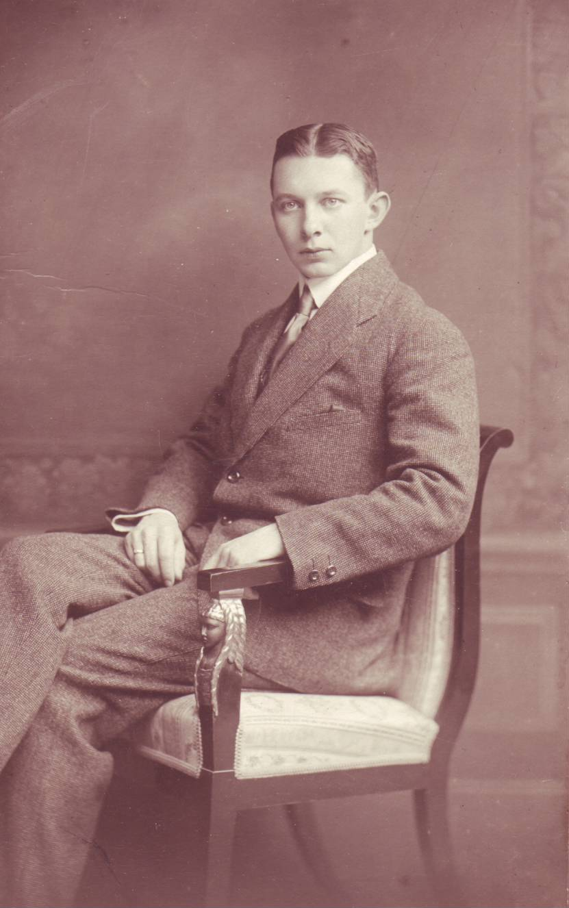 Zdeněk Hynek Bárta kolem roku 1919. Z rodinného archivu.